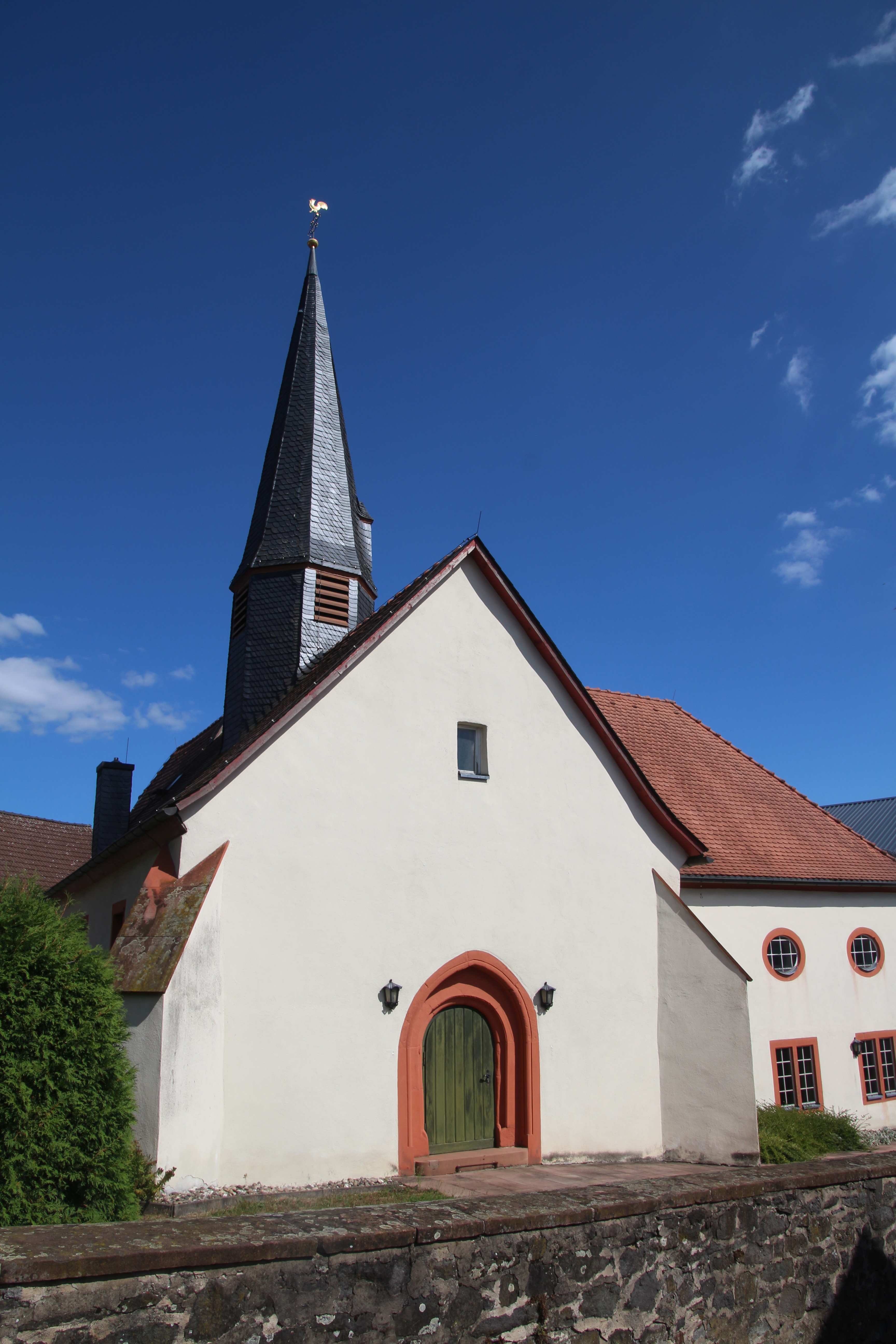 Evangelische Kirche Fauerbach, Gemeinde Nidda, Wetteraukreis, Hessen